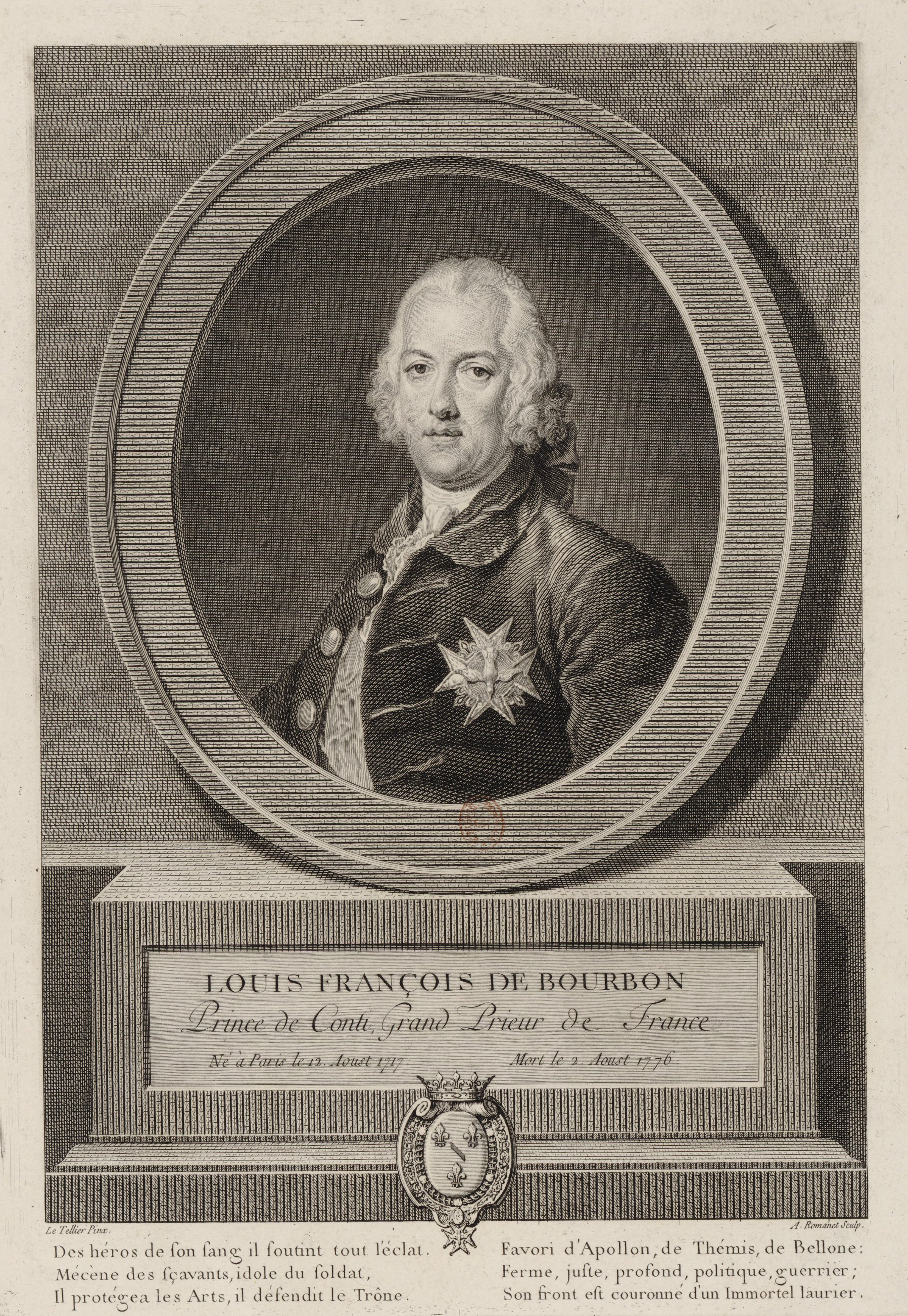 Portrait de Louis François de Bourbon (1717-1776)